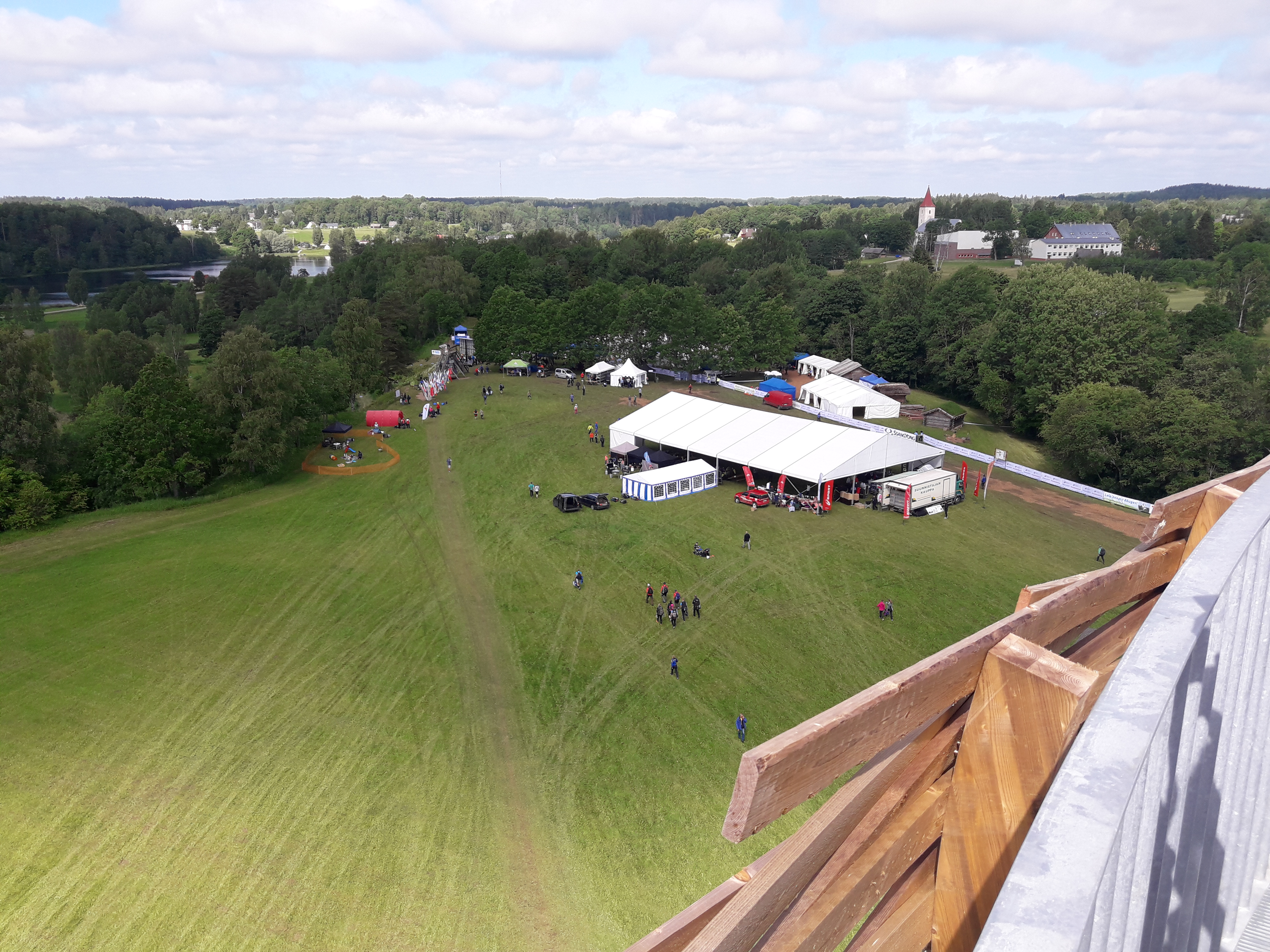 World championships in Tindi (near Rõuge), view from Pesapuu tower